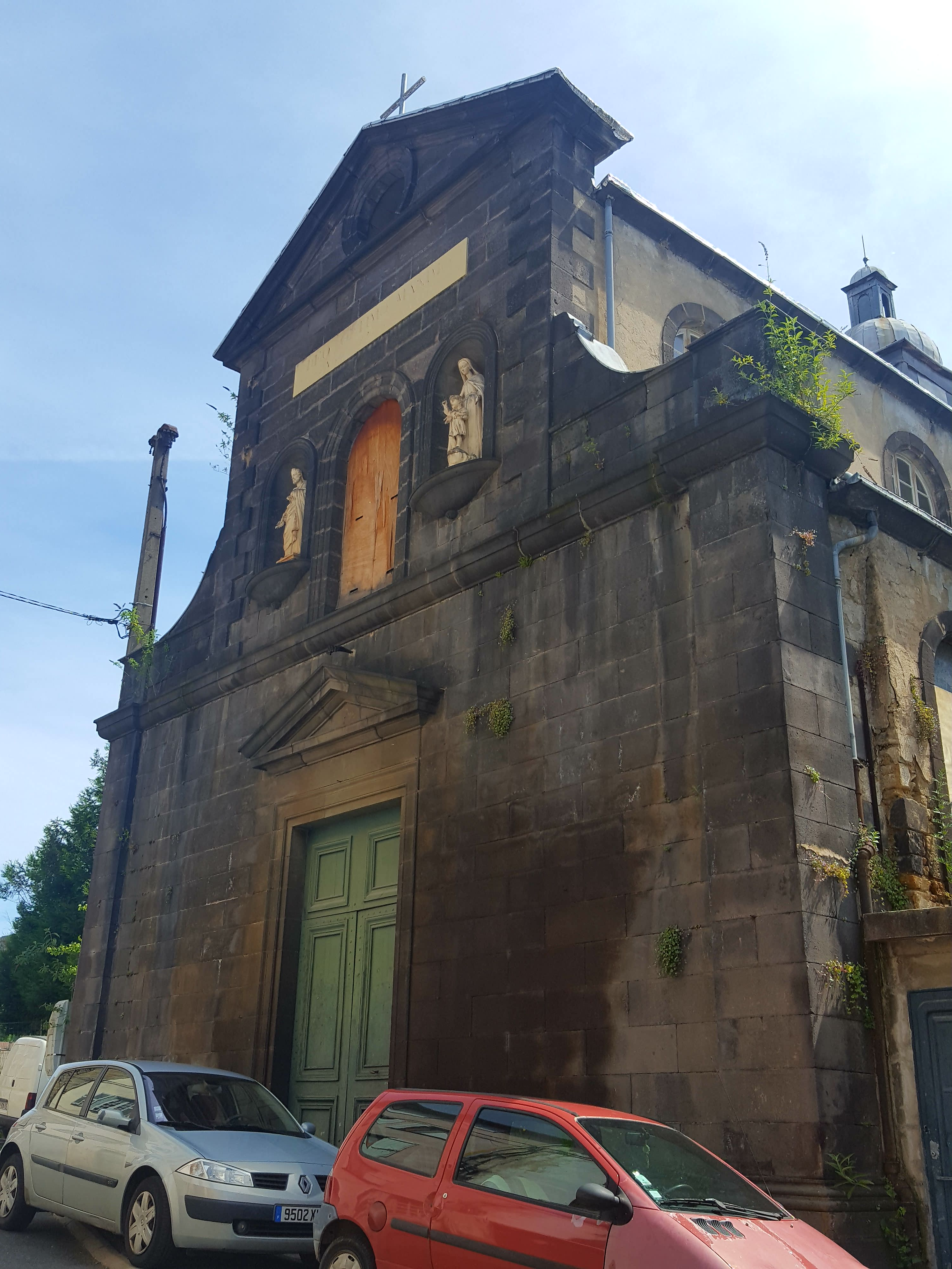 Chapelle de l'ancien hôpital de Thiers 63